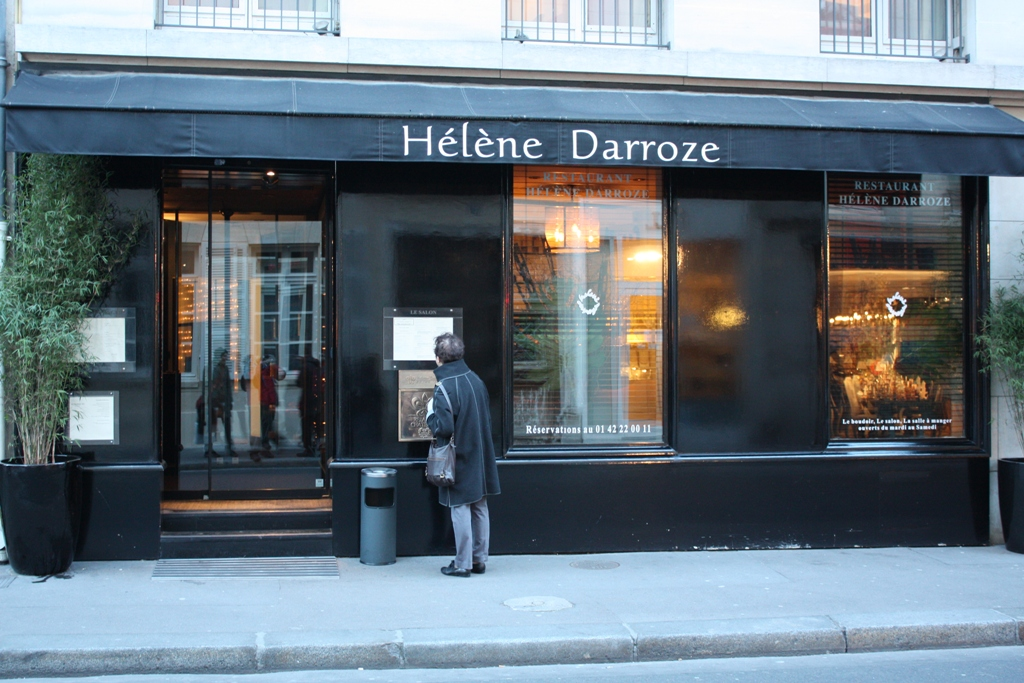 Restaurante de HElène Darroze